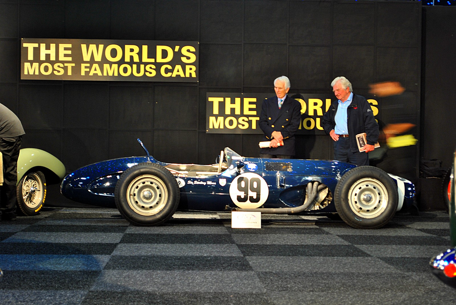 Ferguson-Climax P99 4 wheel drive Rob Walker Racing 1961